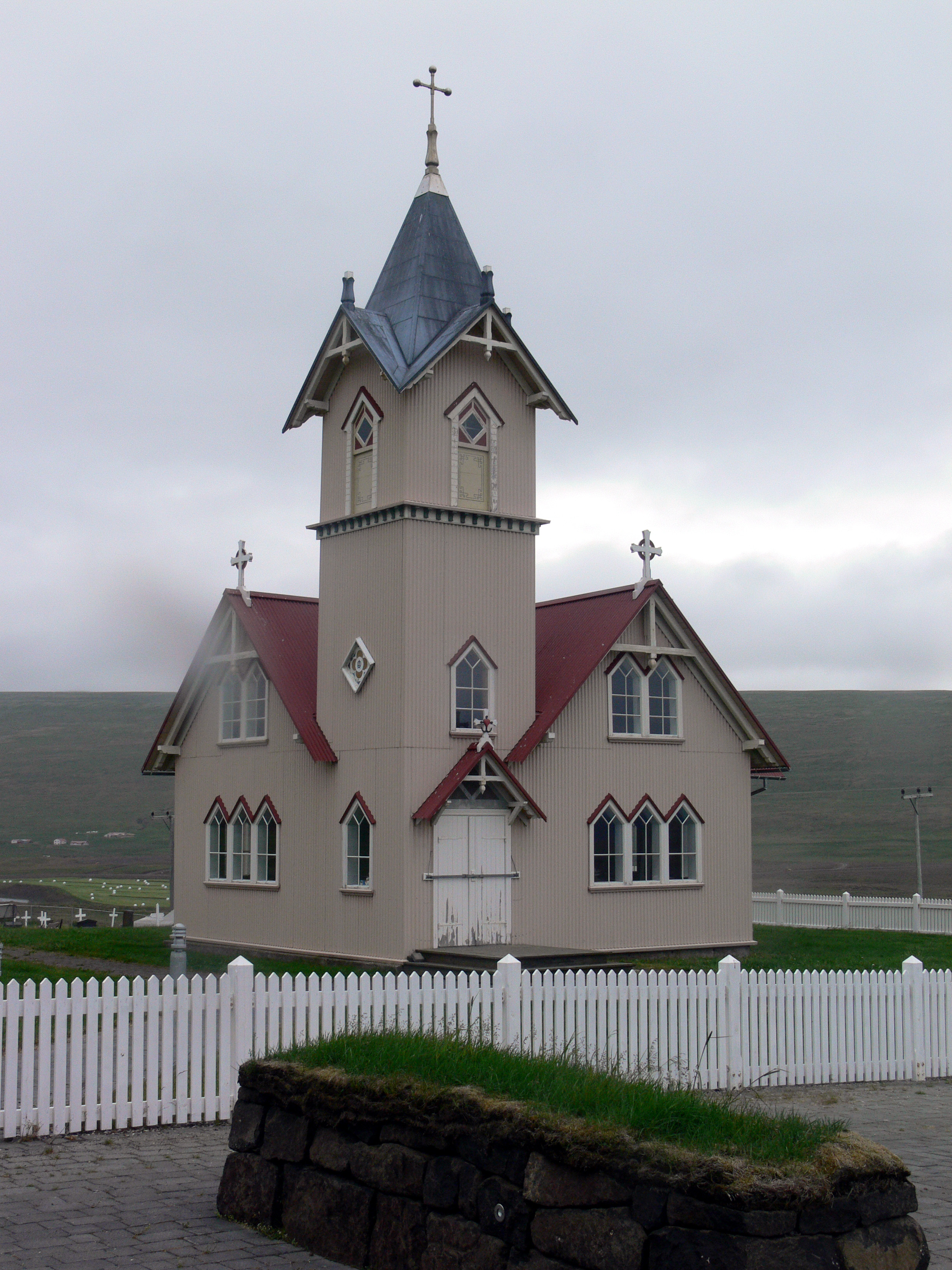 Hjarðarholtskirche in Laxárdalur.